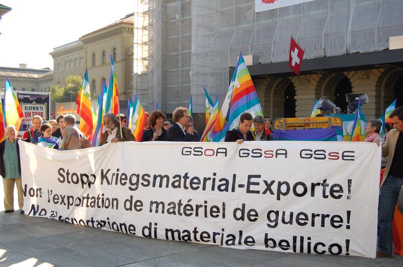 Einreichung der Eidgenössische Volksinitiative «für ein Verbot von Kriegsmaterial-Exporten» der GSoA in der Schweiz